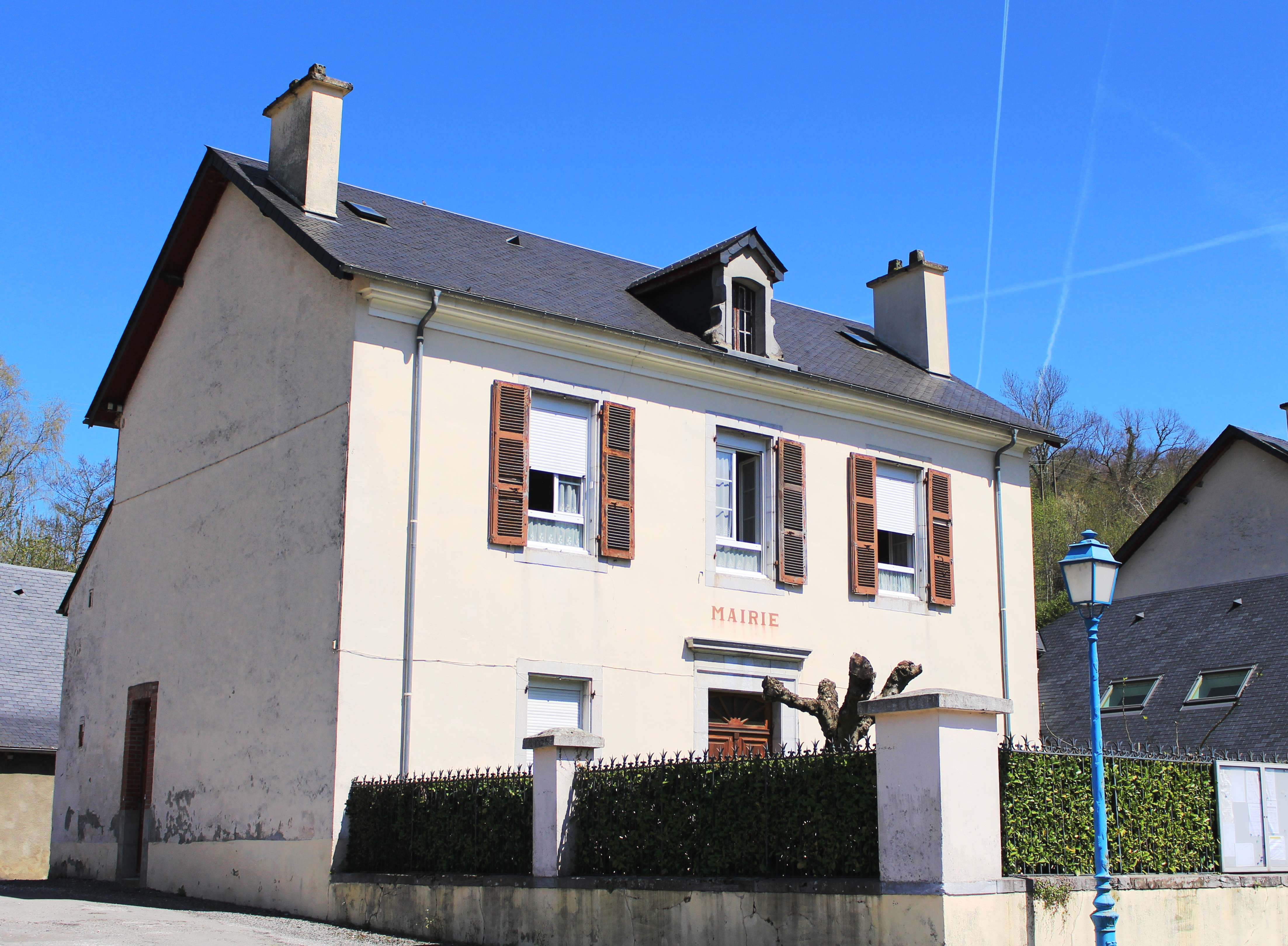 Mairie de Peyrouse (Hautes-Pyrénées)